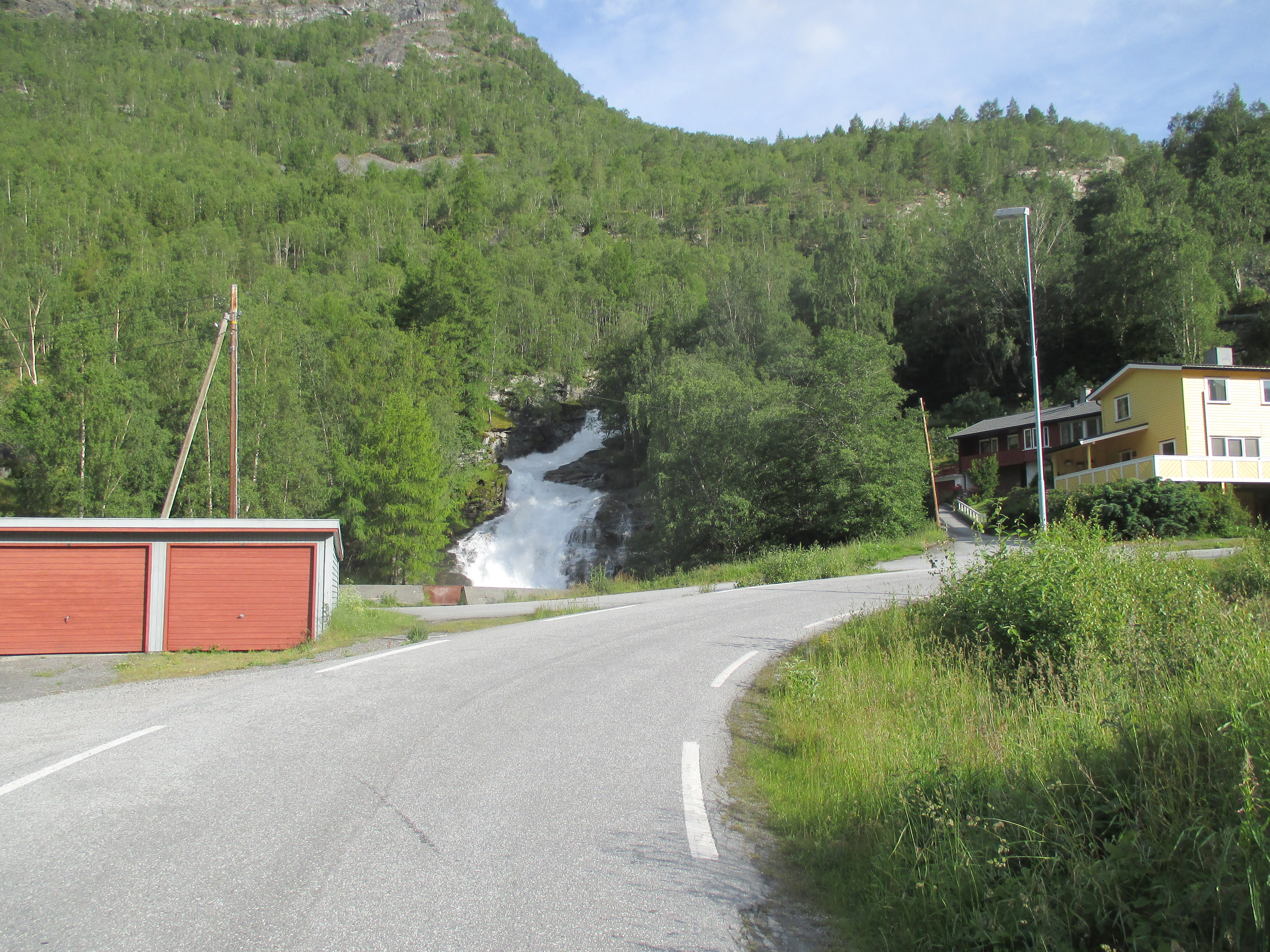 Sørenden av Fardalsvegen (fylkesvei 302) i Øvre Årdal